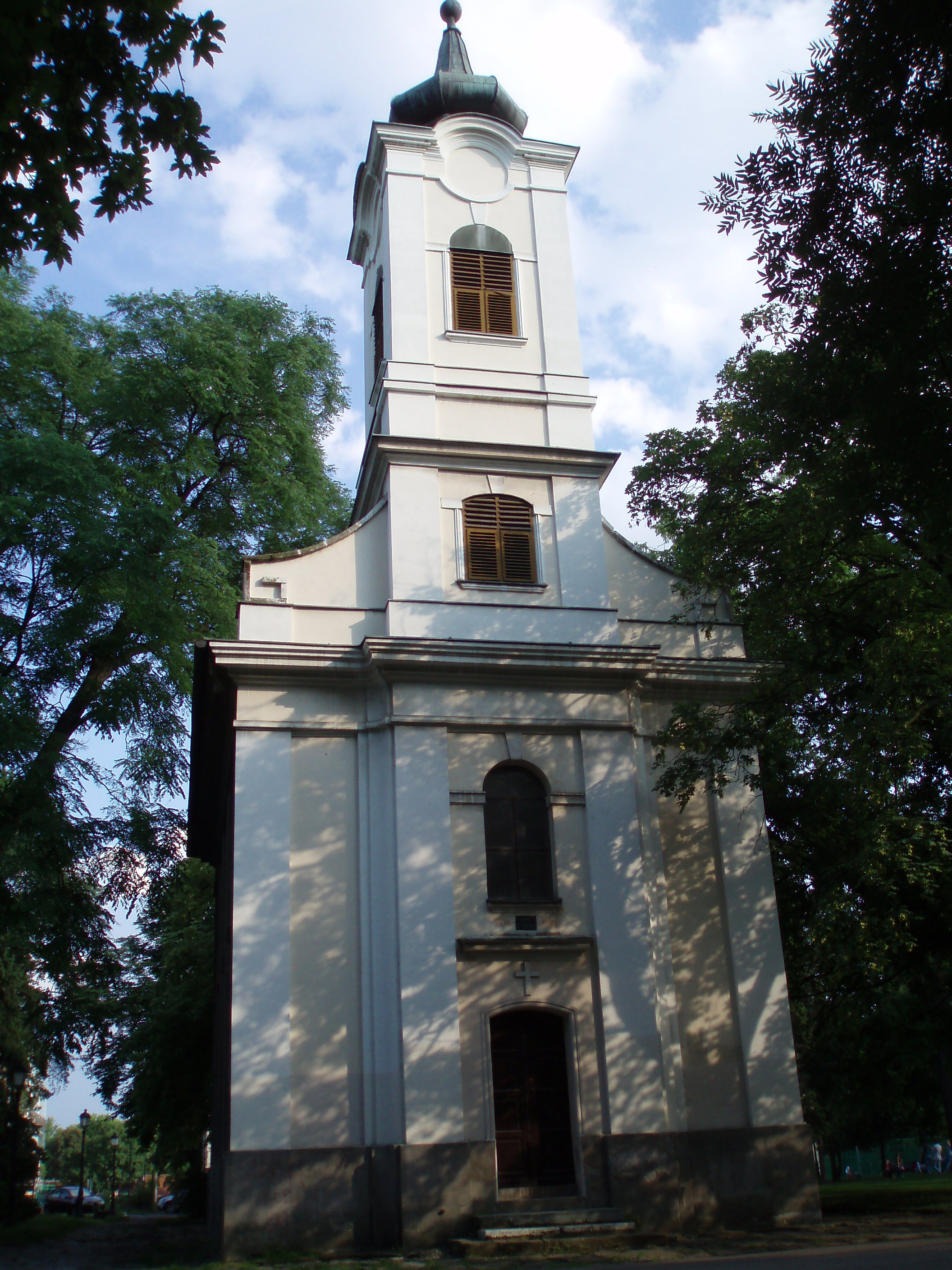 Фотографија цркве светог Рока која се налази у Градском парку у Земуну, аутор:Nicolo